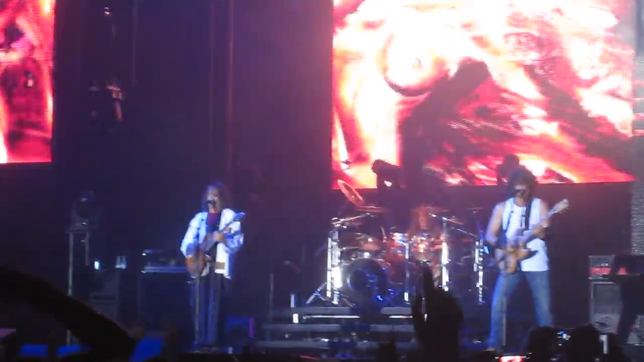 Extremoduro en Cáceres